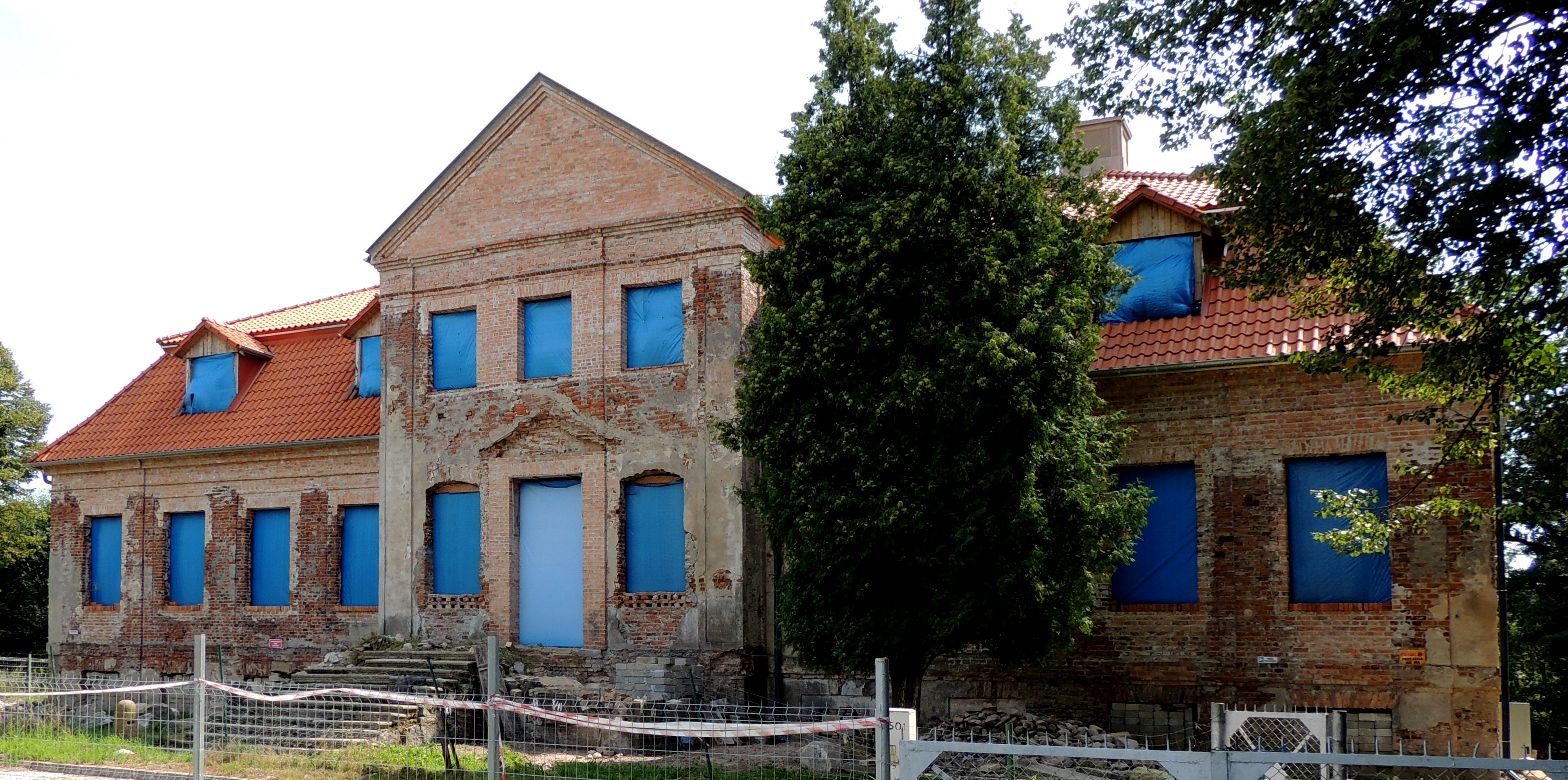 Lipowina - pałac, poł. XVIII w.